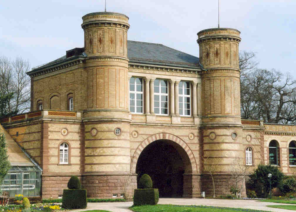 Karlsruhe : Botanischer Garten. Im Bild die Innenseite des Torhauses, errichtet von Heinrich Hübsch im Stil des Romantizismus (Mitte 19. Jahrhundert).